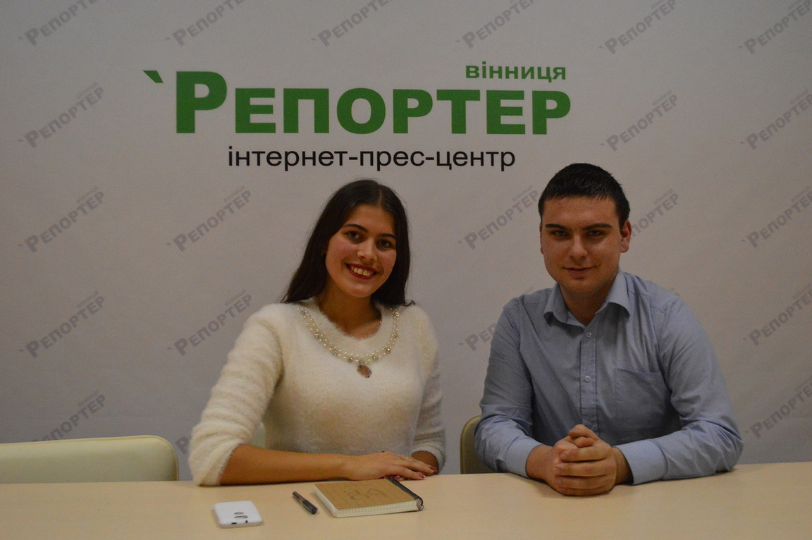 Студенти ВДПУ - Олександр Титко та Руслана Богацька